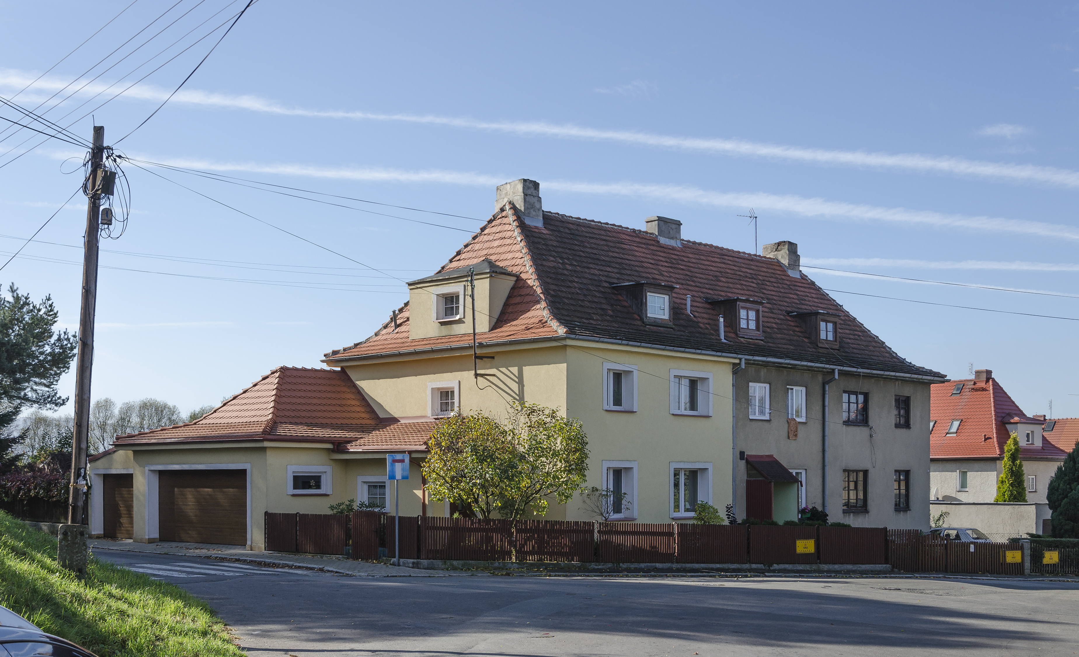 Kłodzko, ul. Tetmajera